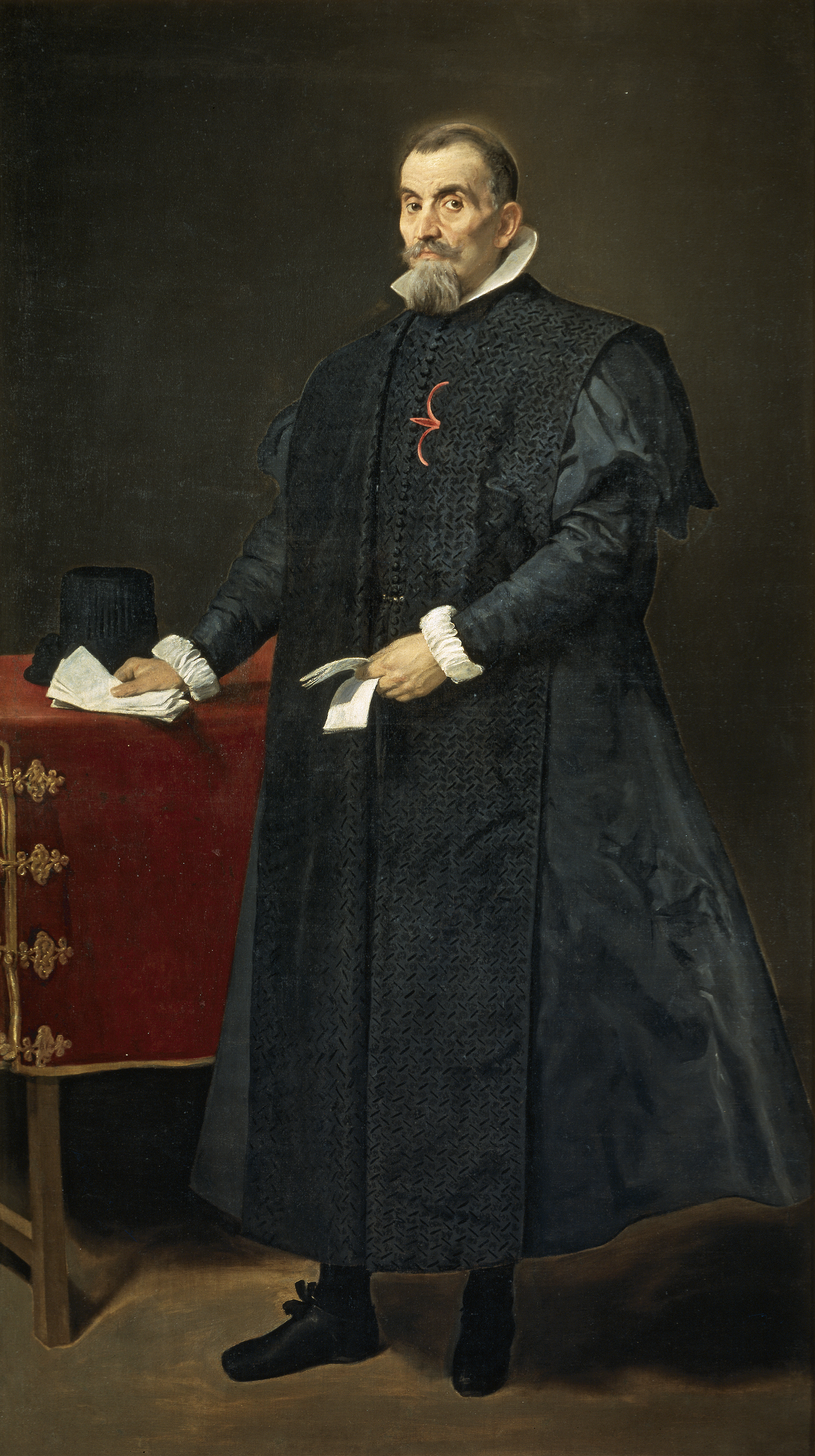 Retrato de Diego del Corral y Arellano (1570-1632), que fue oidor del Consejo de Castilla, caballero de la Orden de Santiago y catedrático de la Universidad de Salamanca. Viste toga negra, detalle que junto a los papeles alude a su oficio en la Justicia, luce la cruz de Santiago bordada en su pechera, símbolo de su origen noble, y se acompaña de un sombrero, que habla del derecho de don Diego a cubrirse como característica de su alto rango social. Cada detalle de la composición, lejos de ser anecdótico, ha sido cuidadosamente elegido por Velázquez, con objeto de caracterizar socialmente a su modelo. La técnica empleada por el pintor, que combina la proximidad del personaje con un fondo y un suelo neutro y un ligero halo alrededor de la cabeza del personaje, sitúan esta obra dentro del estilo de Velázquez de comienzos de la década de los años 30. Este cuadro forma pareja con el retrato de su esposa Doña Antonia de Ipeñarrieta y Galdós, y su hijo don Luis (P01196). Ambos permanecieron en manos de la familia hasta que fueron legados al Museo del Prado por la duquesa de Villahermosa.